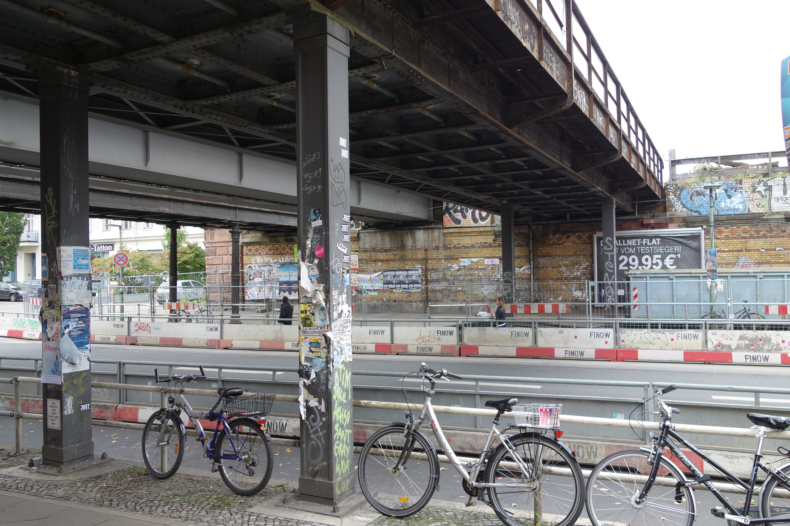 Yorckbrücken in Berlin, S-Bahnbrücke der Wannseebahn stadtauswärts